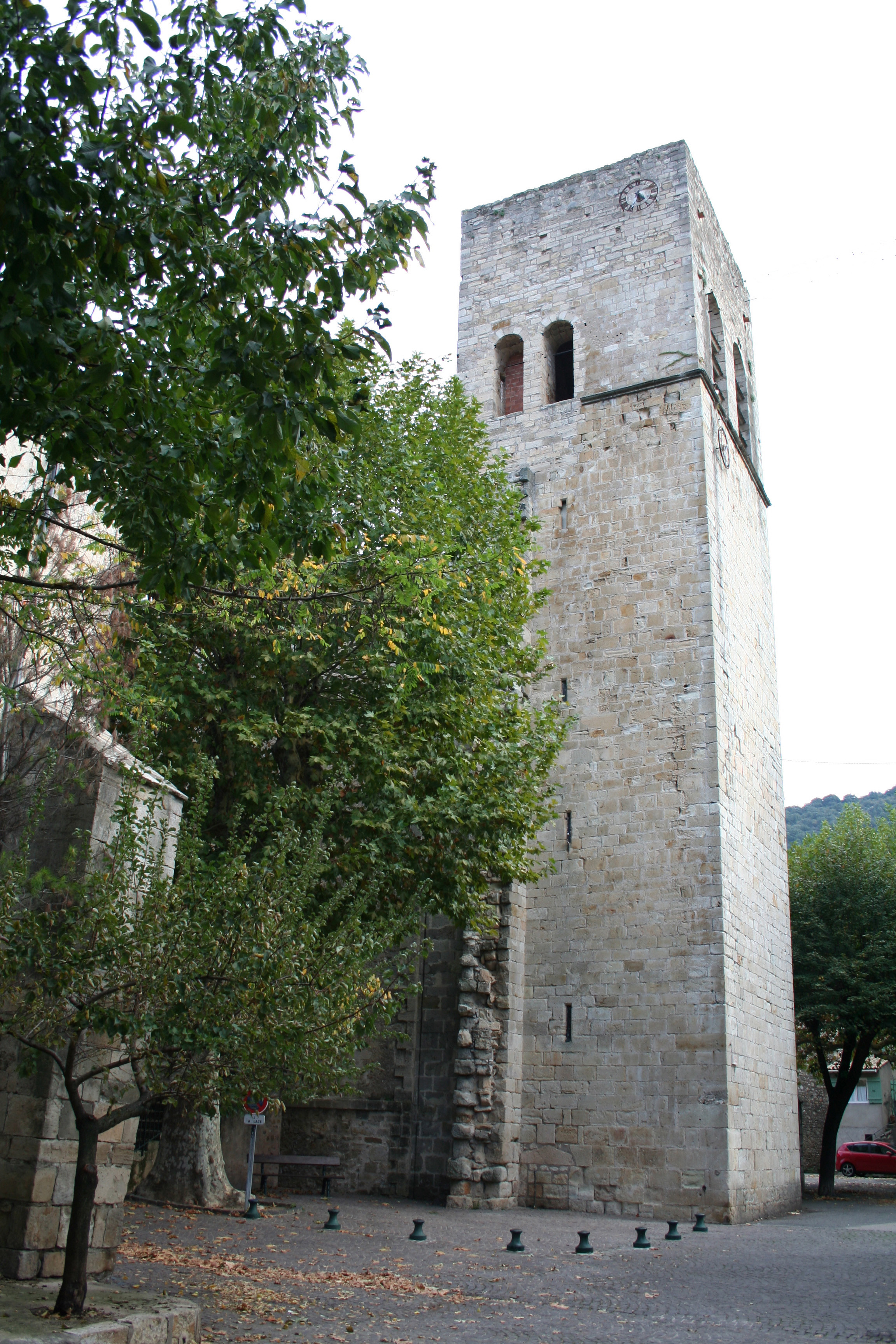 Villemagne-l'Argentière (Hérault) - Tour de l'église Saint-Majan.